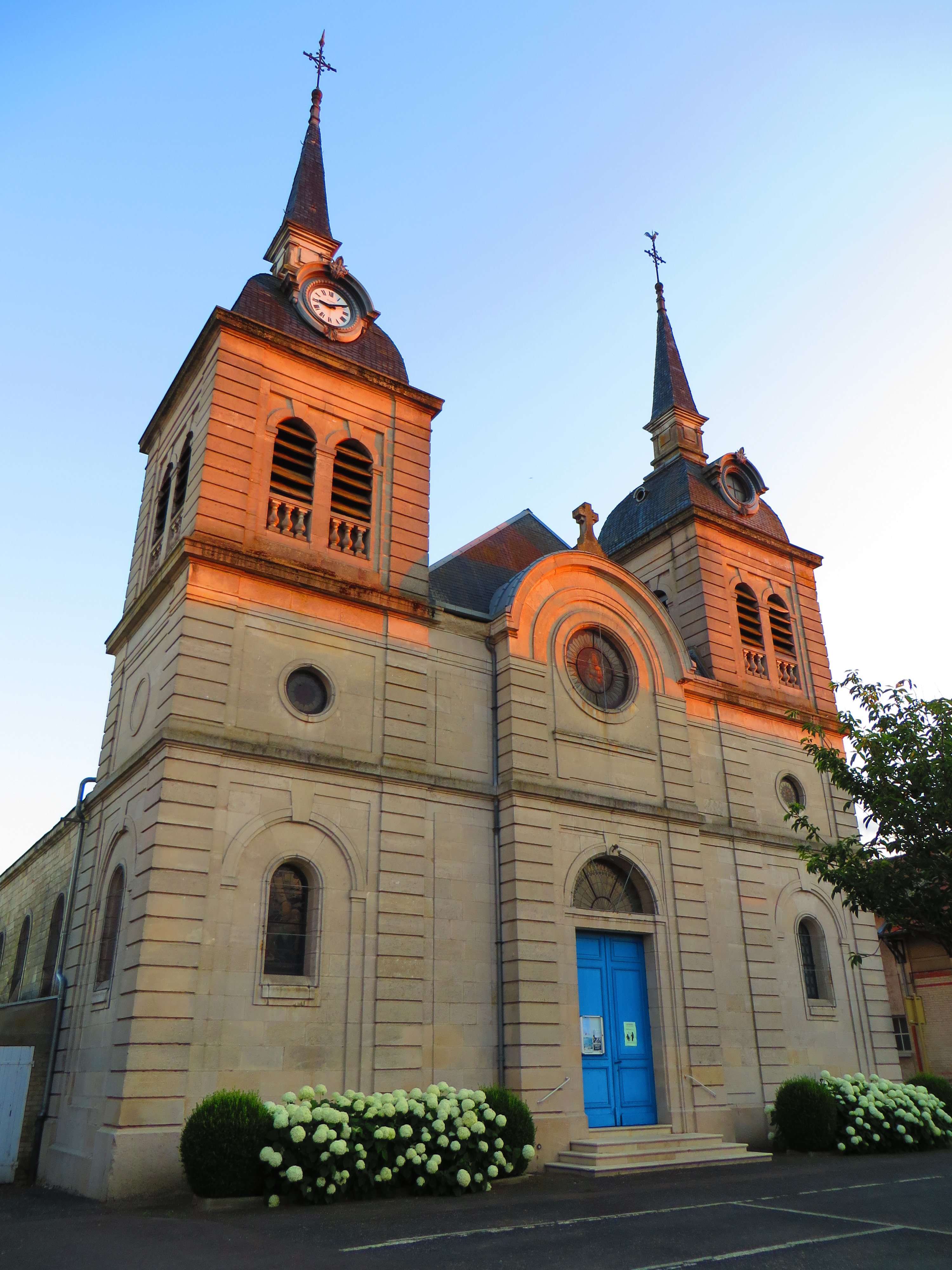 Fresnes-en-Woëvre L'église Saint-Pierre-ès-Liens